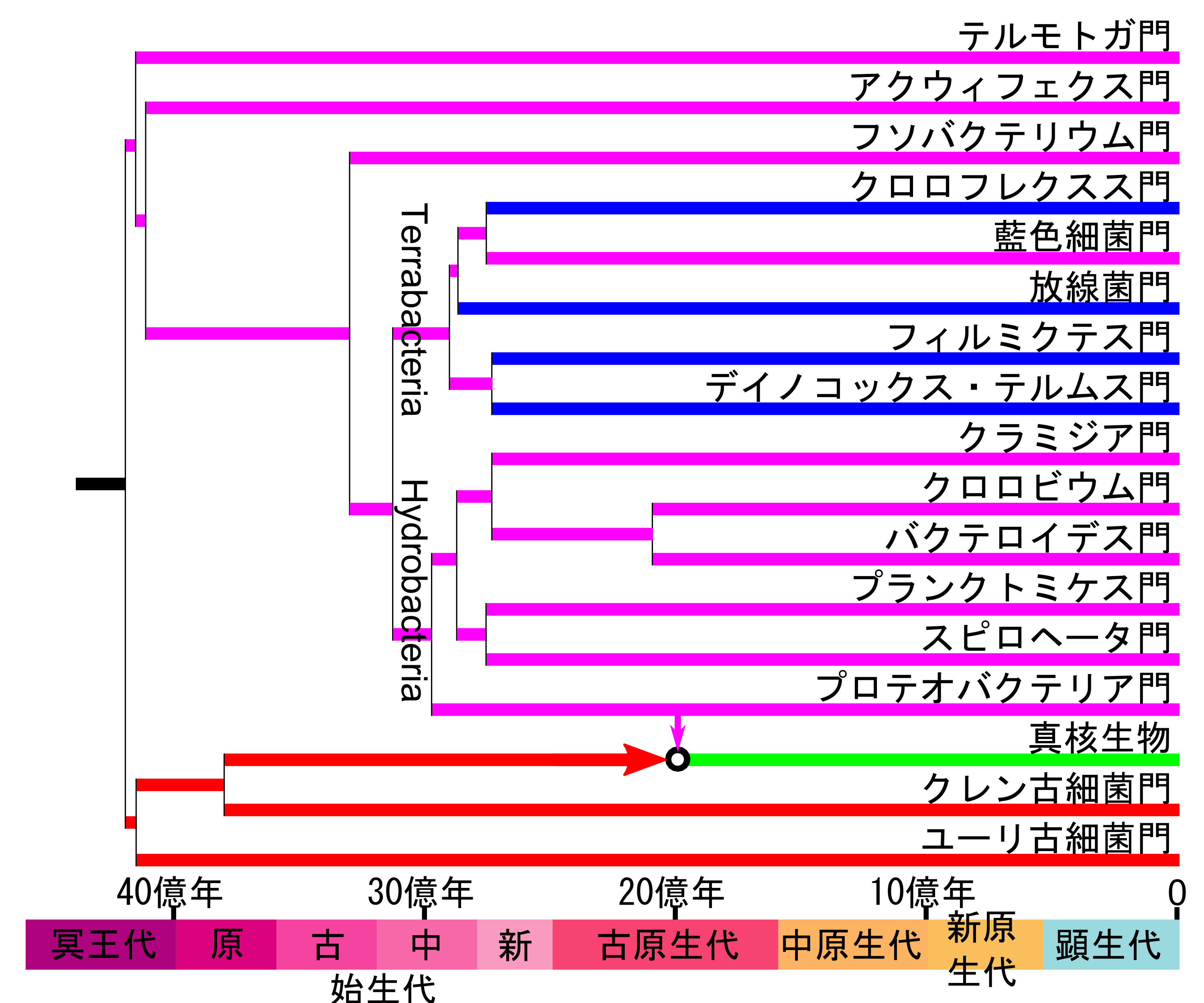 The TimeTree of Life Battistuzzi, F. U., A. Feijão, and S. B. Hedges. 2004. A genomic timescale of prokaryote evolution: insights into the origin of methanogenesis, phototrophy, and the colonization of land. BMC Evol. Biol. 4:44. Battistuzzi FU, Hedges SB (February 2009). "A major clade of prokaryotes with ancient adaptations to life on land". Mol. Biol. Evol. 26 (2): 335–43. など参考。 グラム陽性菌を含む系統は青色、その他の細菌門は紫色、古細菌は赤、真核生物は緑。地質年代の色はTemplate:Fossil rangeに従った。